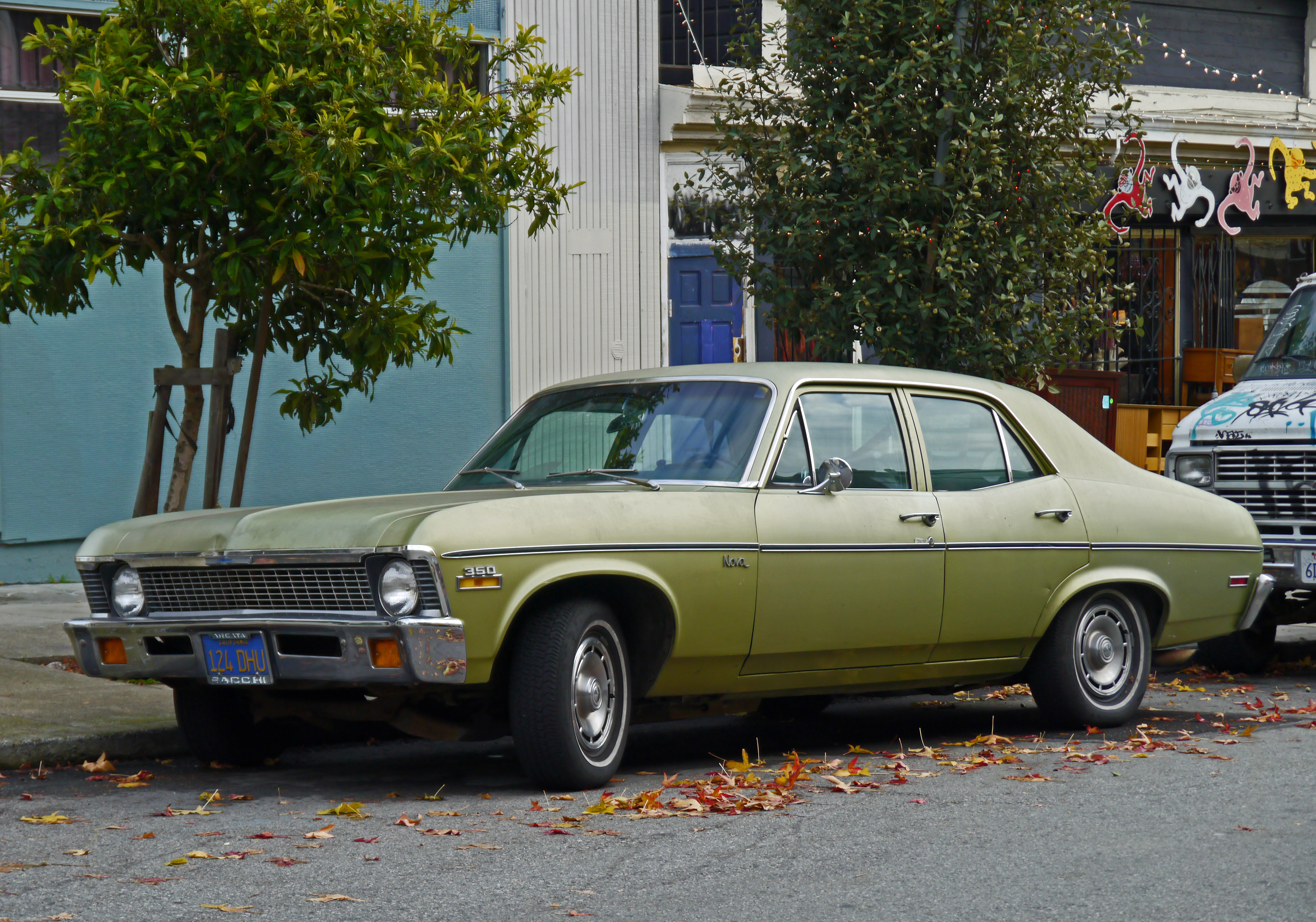 1969-1972 Chevrolet Nova 350 sedan. 350ci (5.7L) V8 engine.